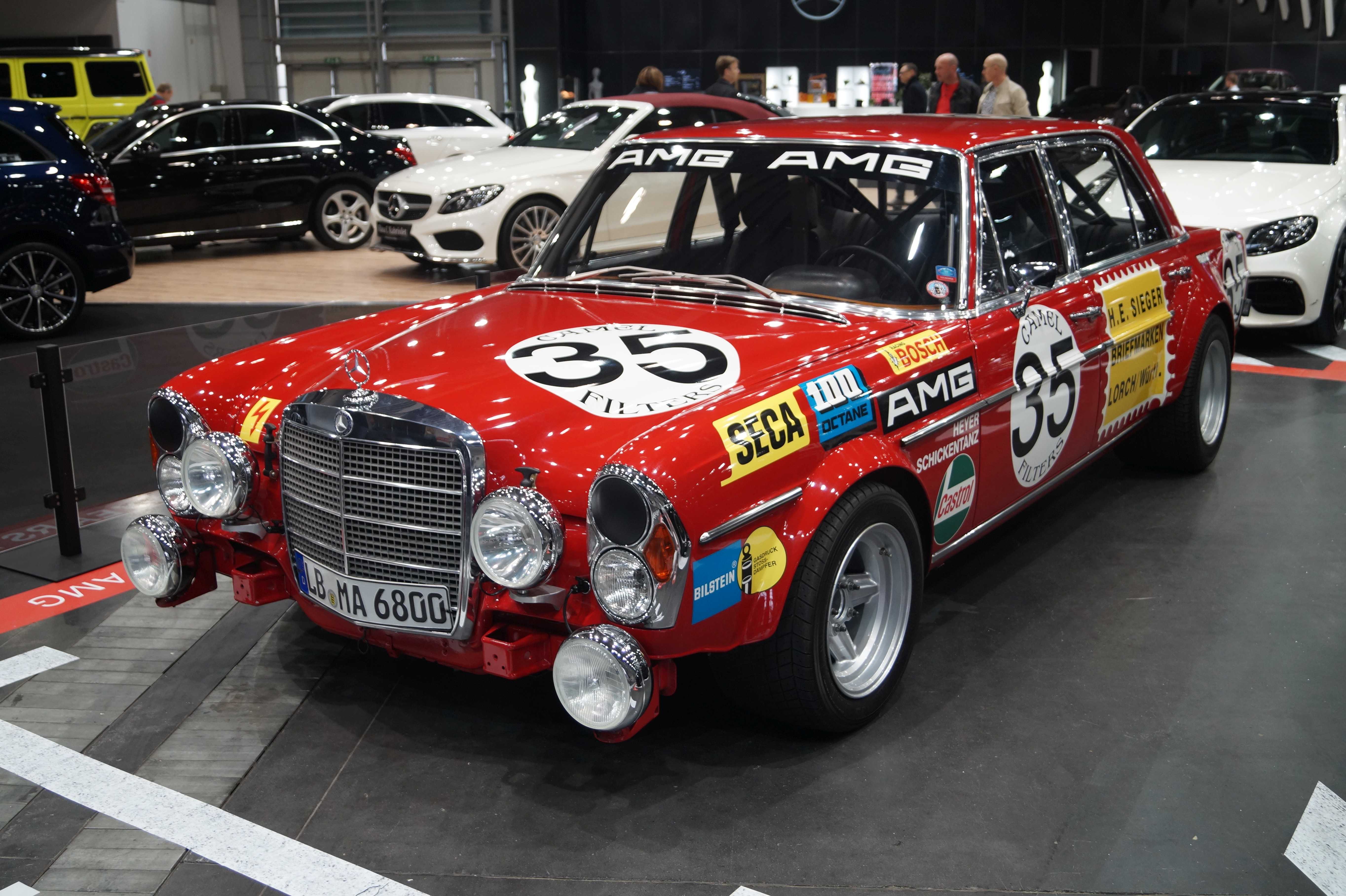 Lewy przód Mercedesa-Benz 300SEL 6,3 (W109) na Motor Show Poznań 2017.